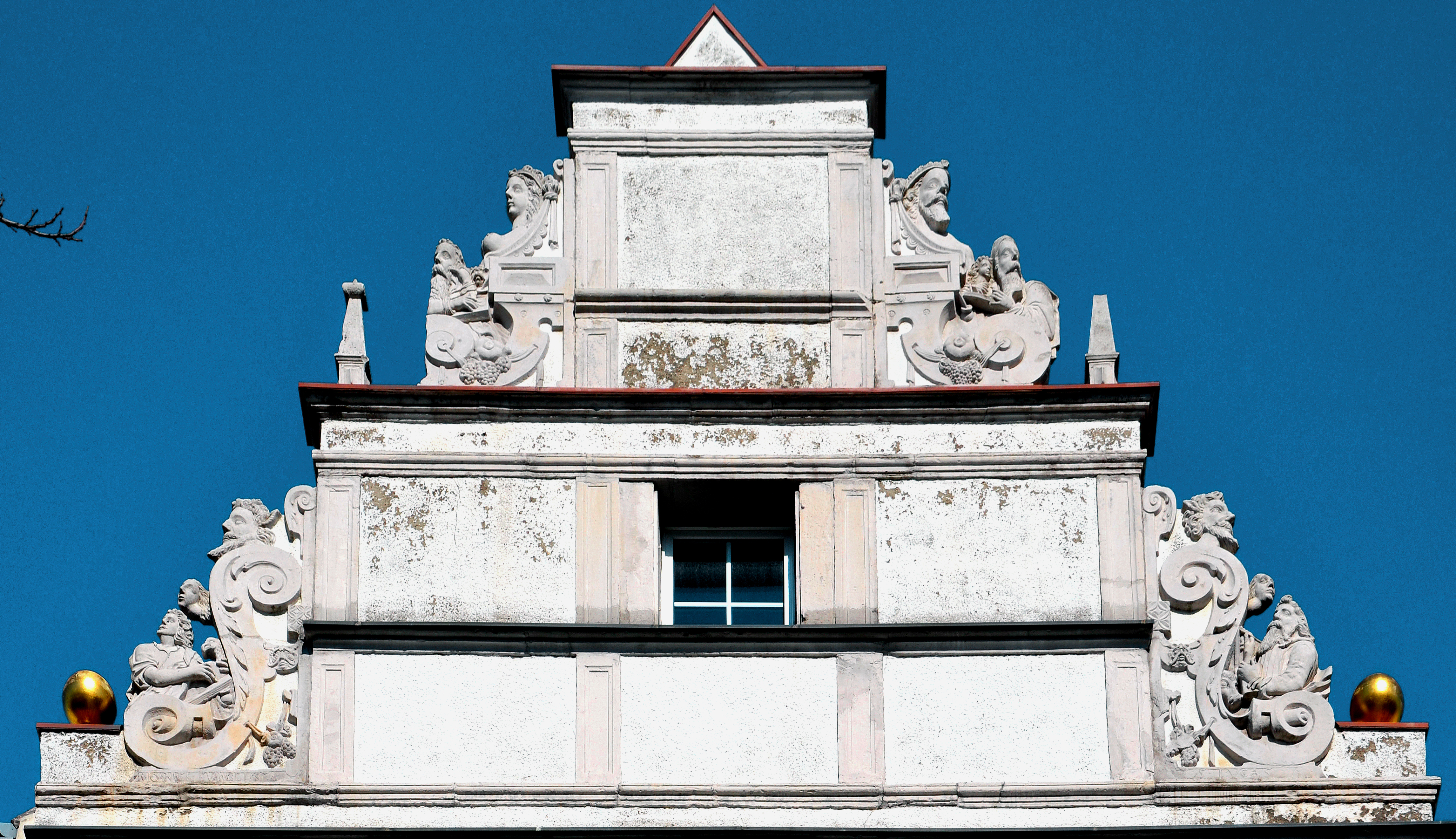 Der Staffelgiebel des denkmalgeschützten Nachkriegsbaues unter der - heutigen - Adresse Osterstraße 30 in Hannover, gegliedert durch Gesimse und Lisenen, verwendet die originale Bauplastik des Ursprungsgebäudes von 1611 mit Volutenwerk, in das die vier Evangelisten hineinkomponiert sind ...